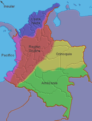 Mapa de las regiones naturales de Colombia